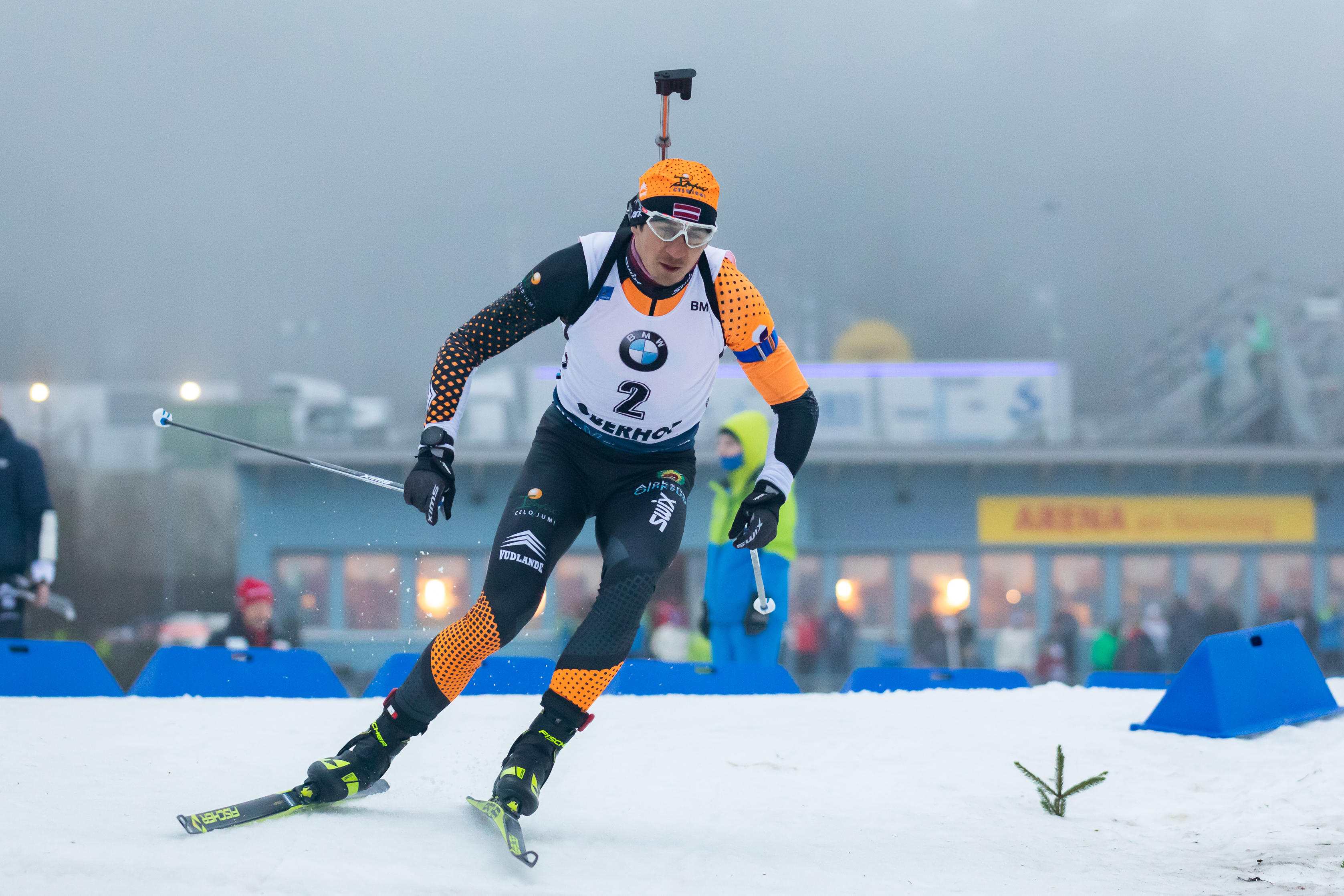 IBU World Cup Biathlon Oberhof; Andrejs Rastorgujevs (LAT, Lettland)